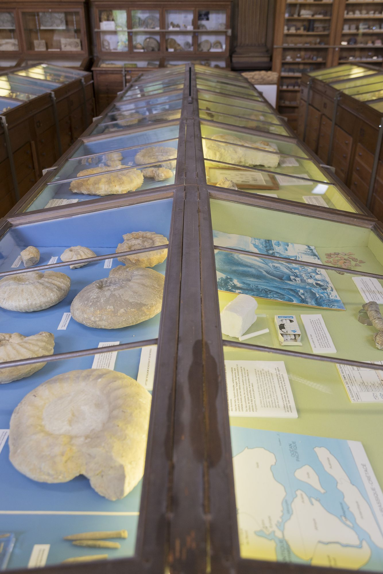 Vitrines et tiroirs avec des réserves des Sciences de la Terre, Muséum d'Angers